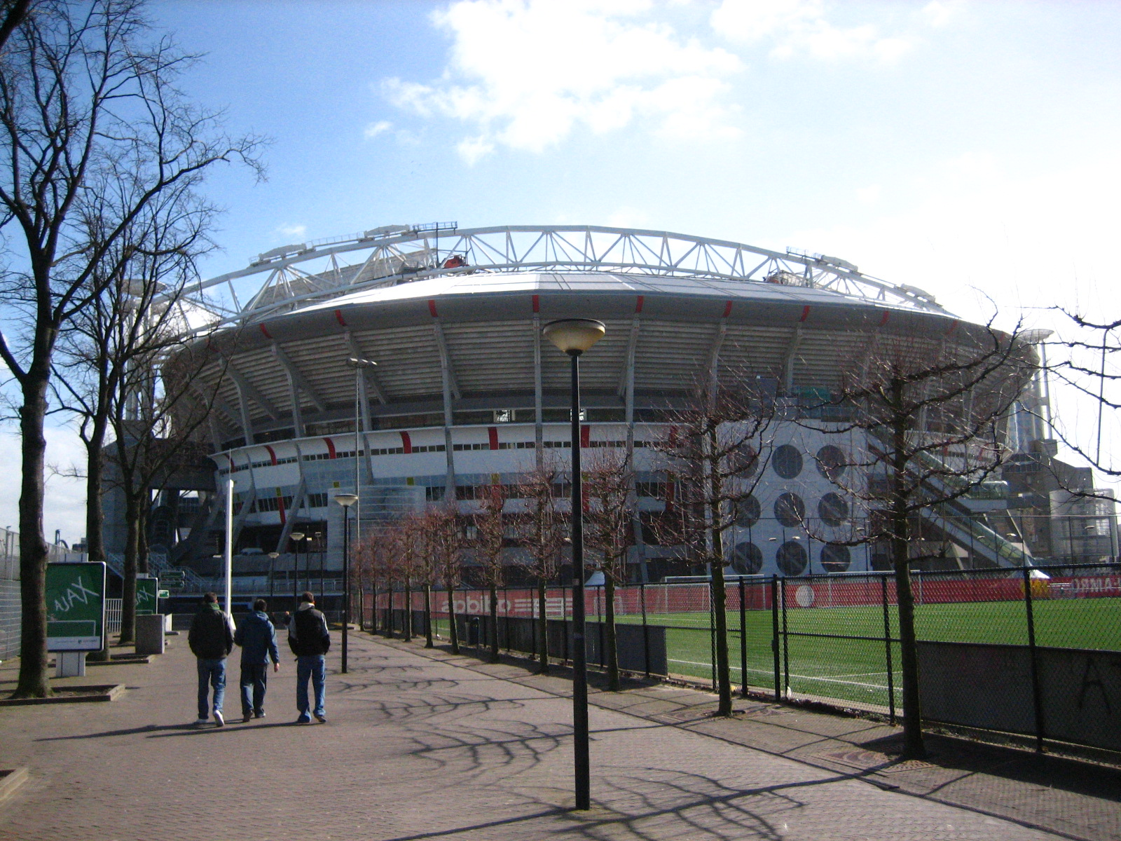 Johan Cruijff ArenA